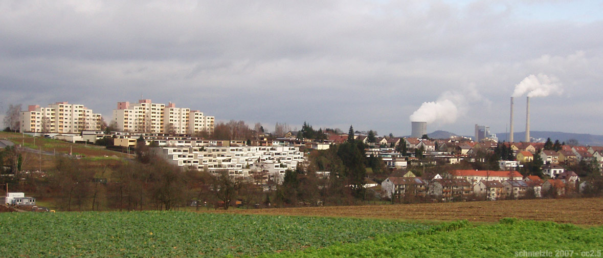 Blick auf das Wohngebiet Maihalde in Heilbronn-Frankenbach, im Hintergrund das Kraftwerk Heilbronn